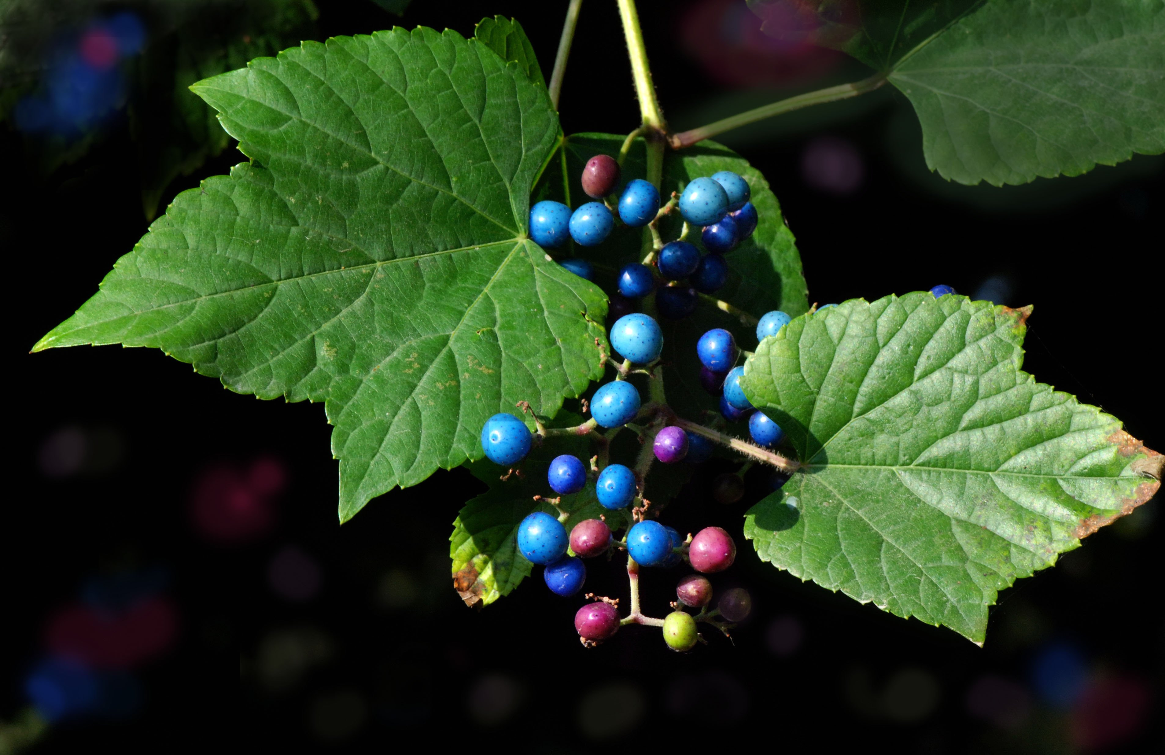 Ampelopsis brevipedunculata, Jardin des Plantes de Paris